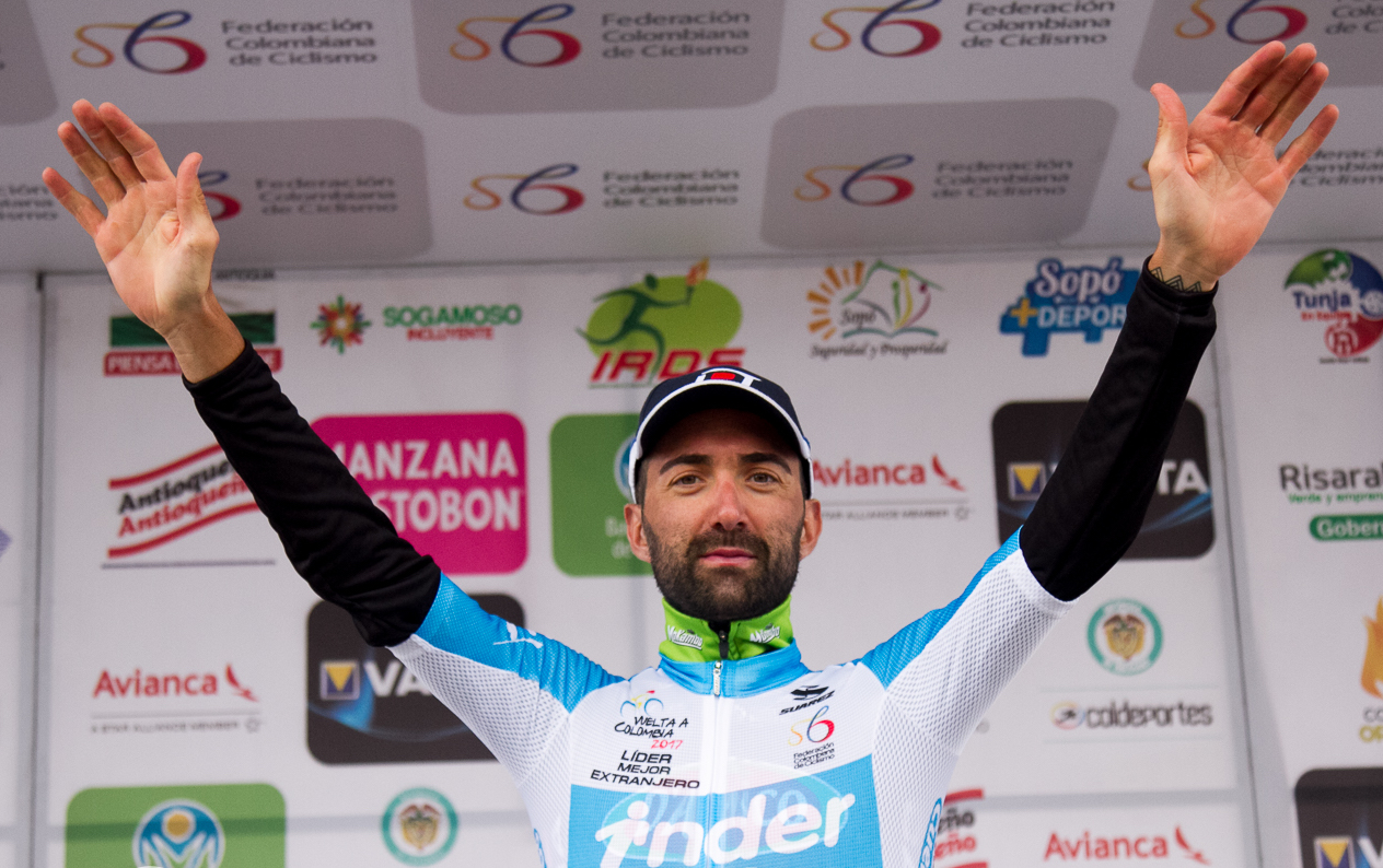 Federico Canuti en el podio. Eta.9 Vuelta a Colombia 2017 Jueves 10 de agosto de 2017. 137Kms La Dorada - Alto de Letras.